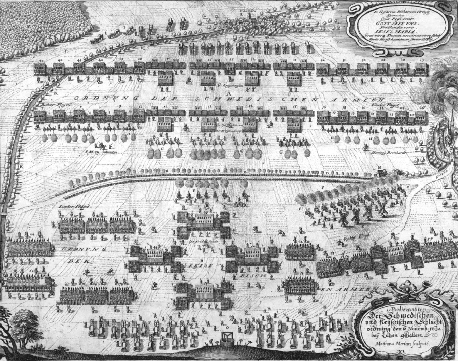 Digitalisat der Bayrischen Staatsbibliothek München; Ausschnitt. Abbildung der Schlacht so bey Lützen den 6. Novemb. 1632. Geschechen in Wikisource